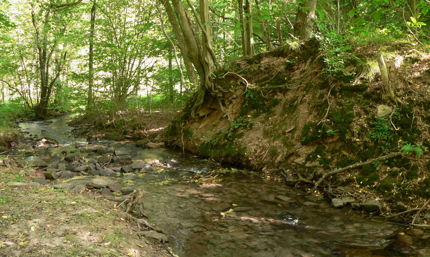 Reiherbach in Nienover mit Dammdurchstich